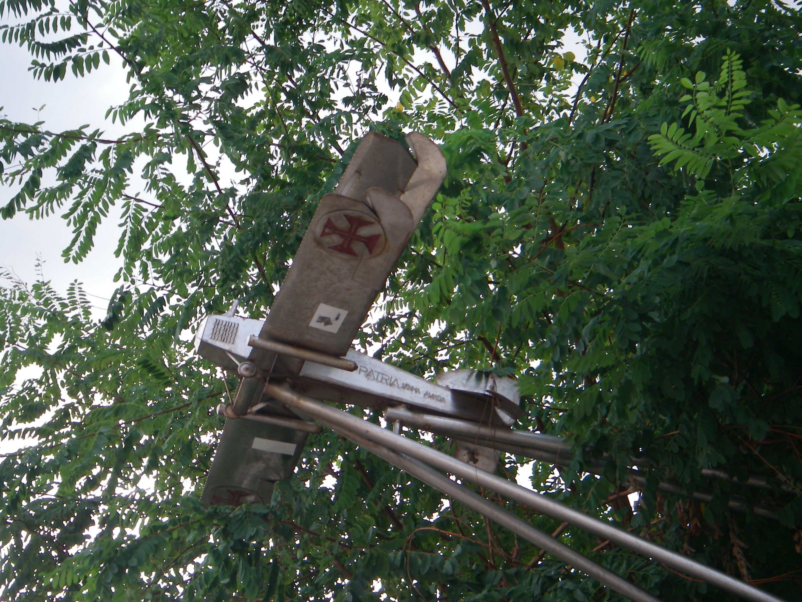 Forte em Vila Nova de Milfontes This file was uploaded for Wiki Loves Monuments in Portugal with the unique identifier 74030.